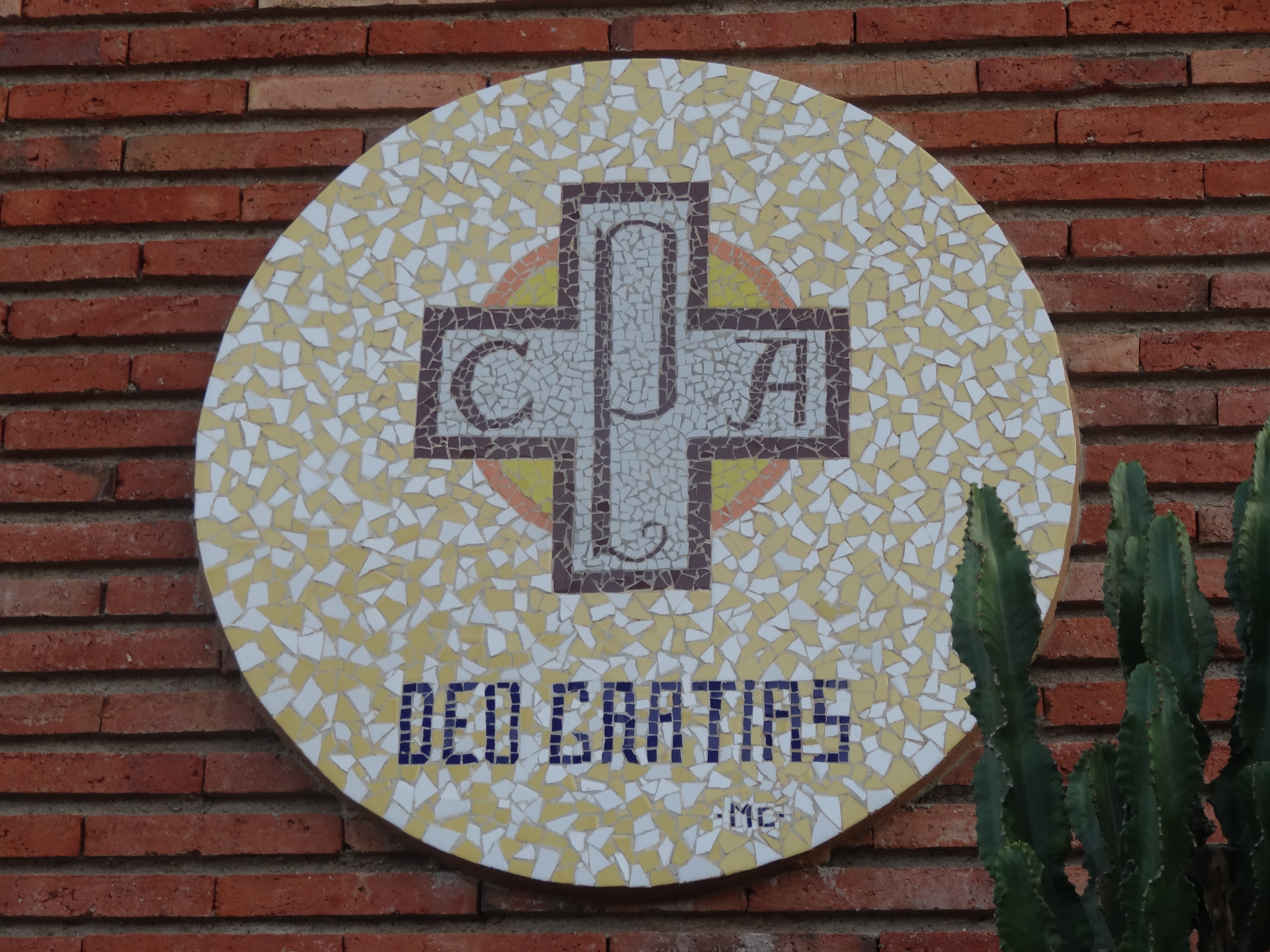 Cottolengo del Pare Alegre. Deo Gratias.